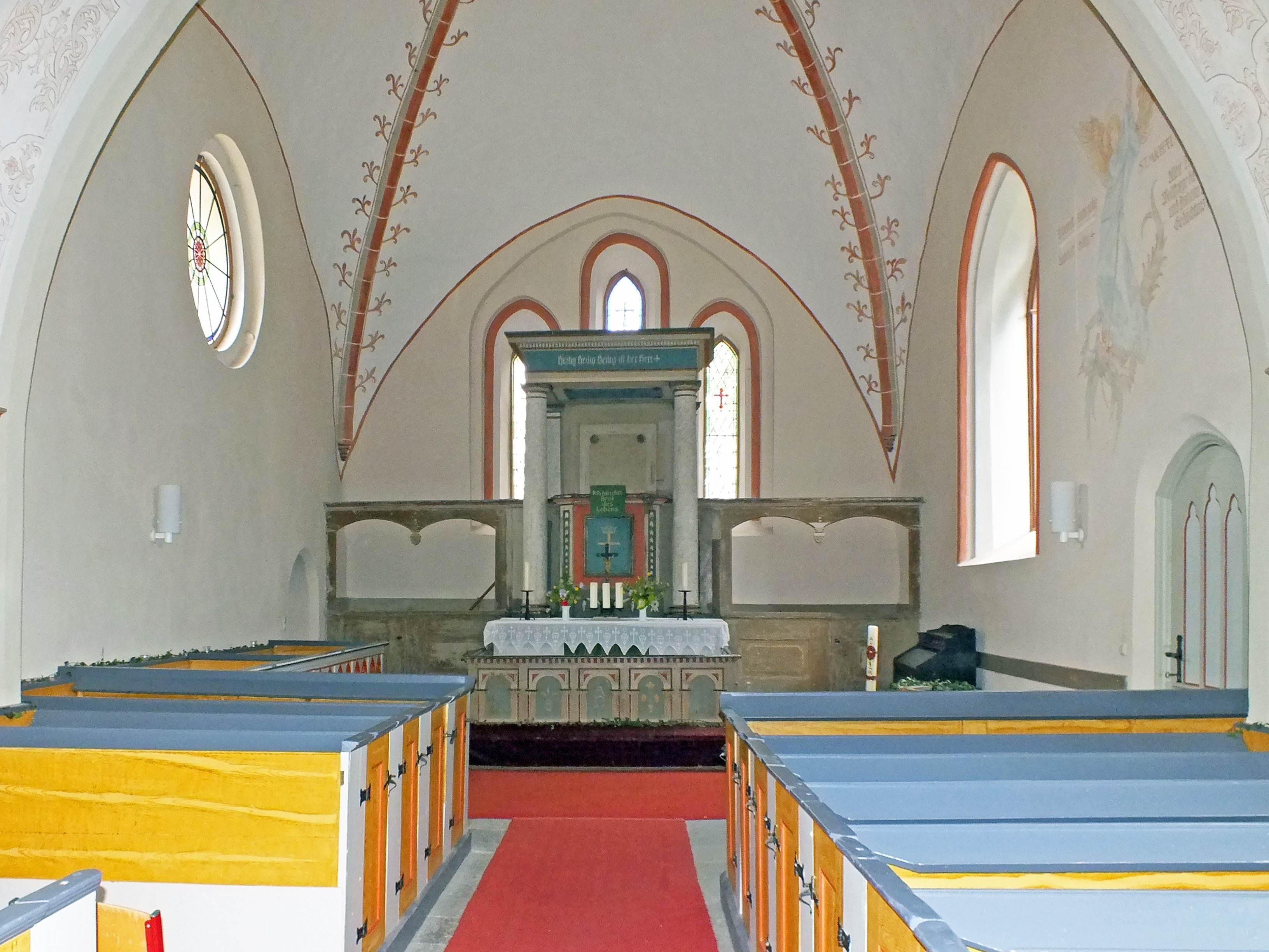 Chorraum mit Altar in der Kirche von Hanshagen